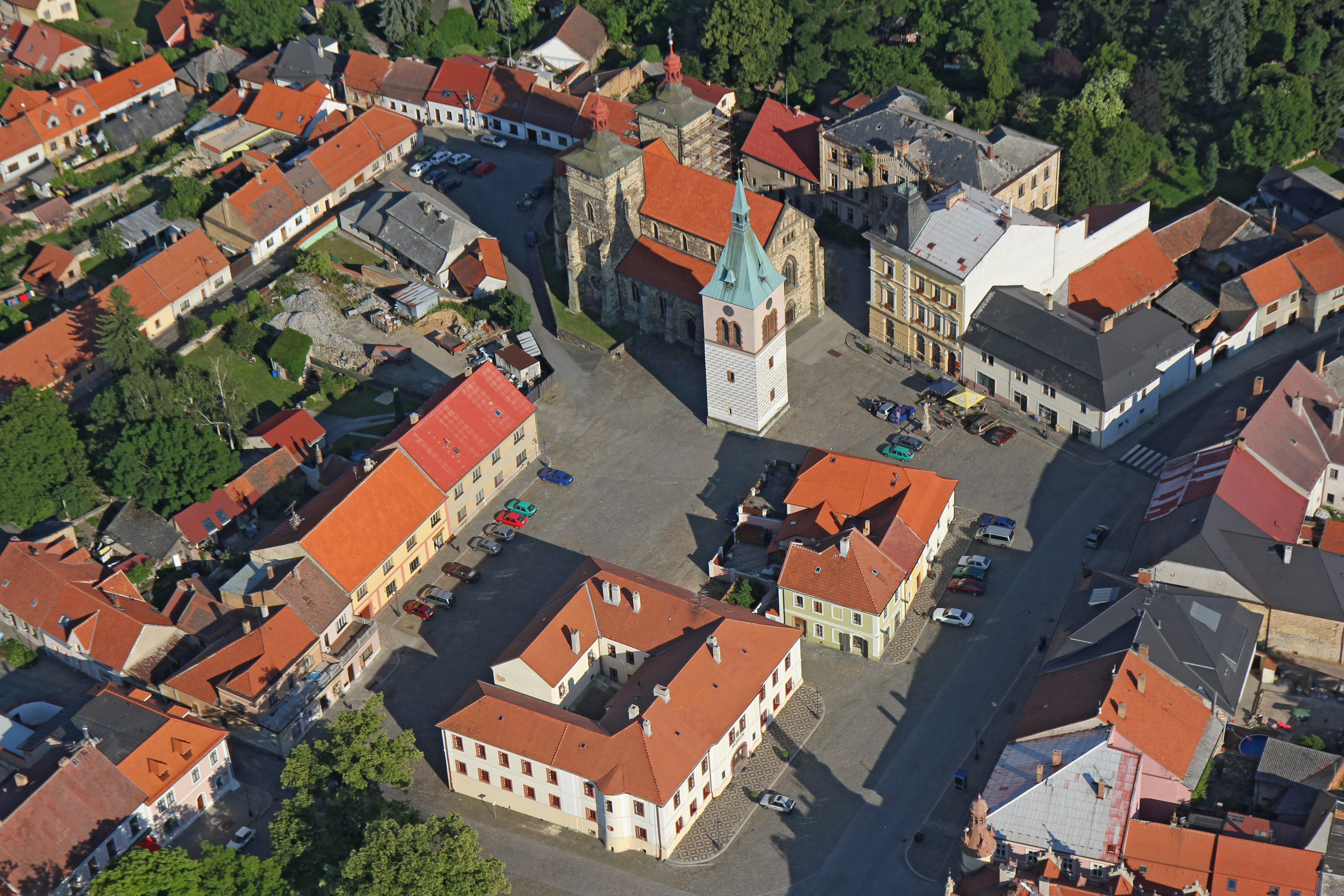 Kostel sv. Štěpána, část stojící a archeologické stopy (Kouřim), hlavní historické náměstí, Kouřim